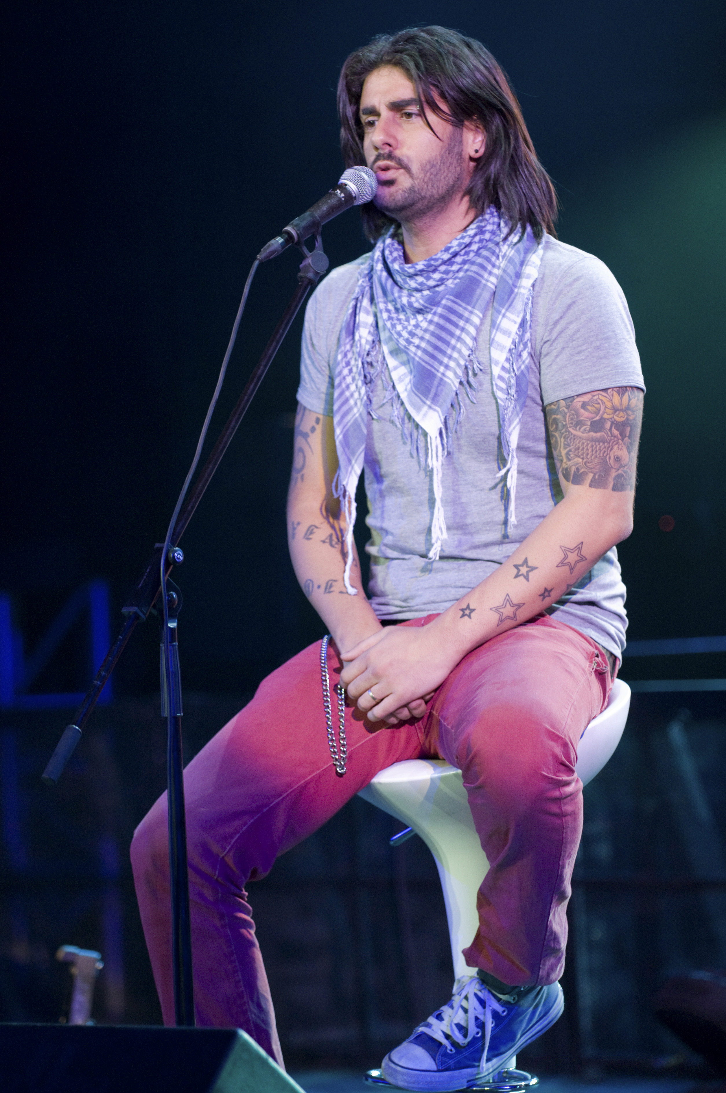 Melendi